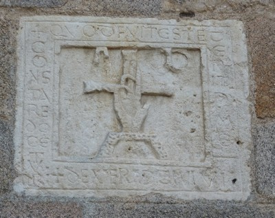 Pierre gravée en calcaire - Eglise St Léger de Bessines-sur-Gartempe